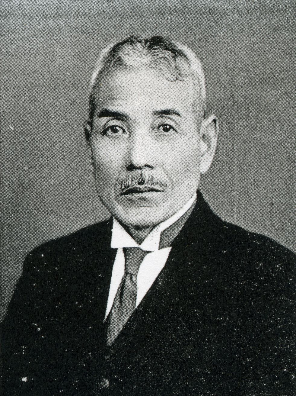 この写真は、吉川吉郎兵衛（1870-1948）の写真です。